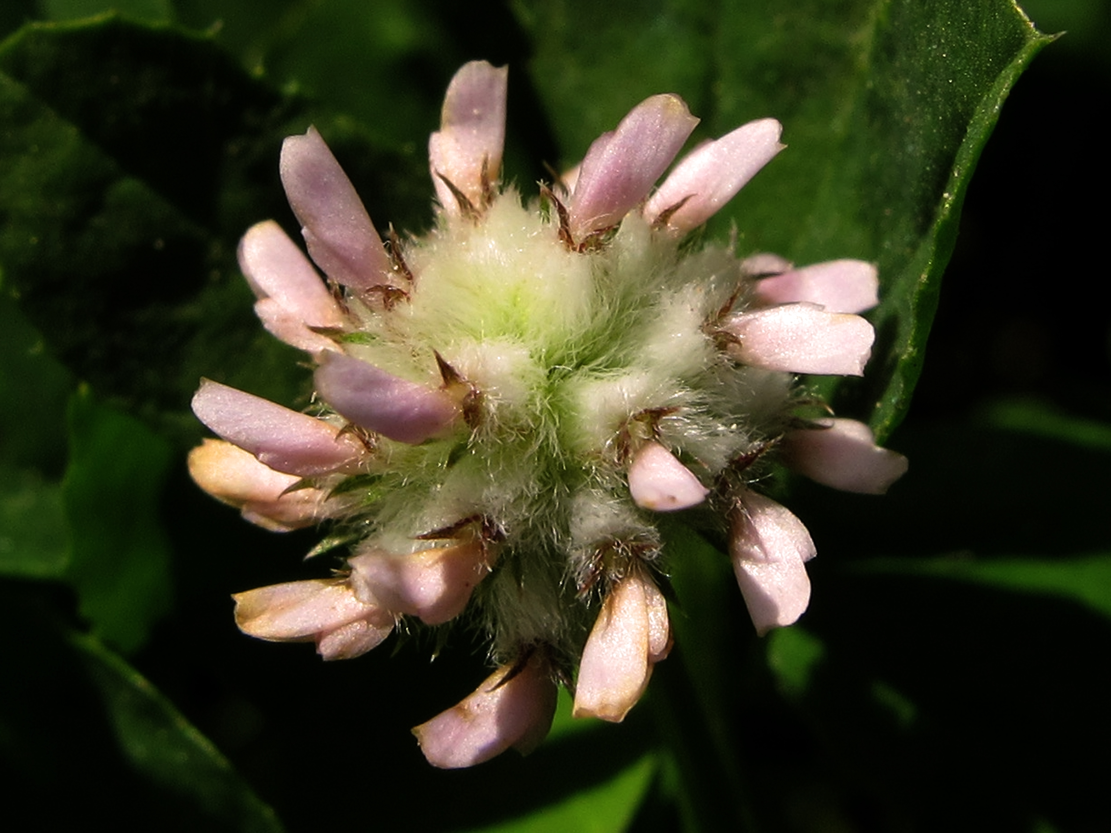 Aparece de forma natural en pastos en las zonas de umbría y es pastado a diente por el ganado. La especie se encuentra abundantemente repartida por debajo de los 900 m. de altitud (500-900) y muestra marcadas preferencias por suelos de pH basicos